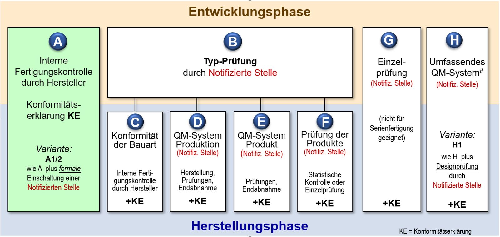 Vereinfachte Darstellung der Module zum Konformitätsnachweis unter Europäischen Richtlinien